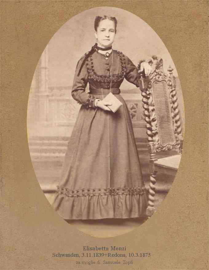 Elisabetta Menzi, seconda moglie di Samuele Zopfi (senior)